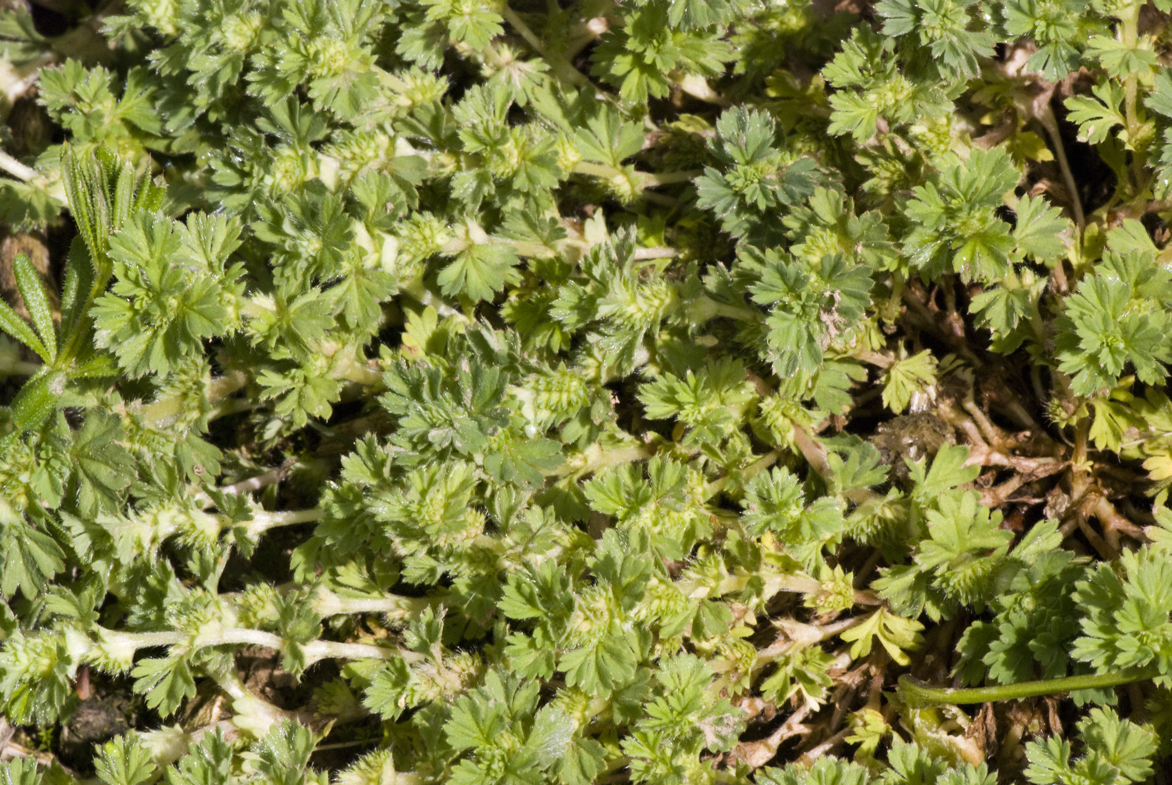 Aphanes arvensis Saint Fuschien (Somme), France